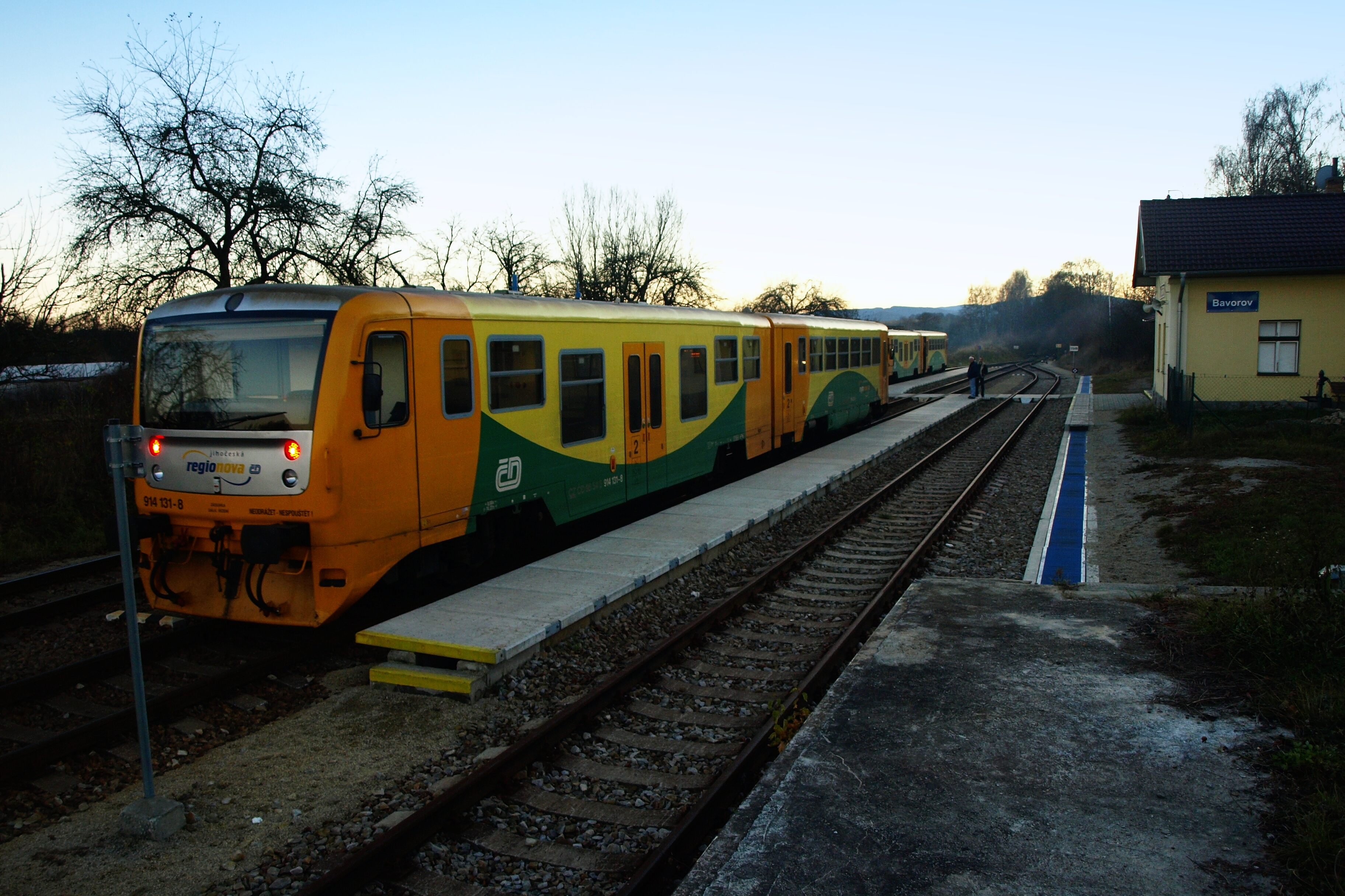 Bavorov - vlakové nádraží